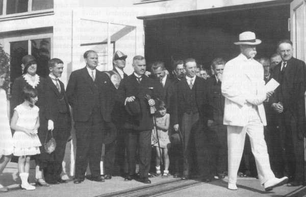 T. G. Masaryk navštívil v červnu 1928 během své cesty po Moravě Výstavu soudobé kultury v Brně (vpravo prof. Karel Absolon)